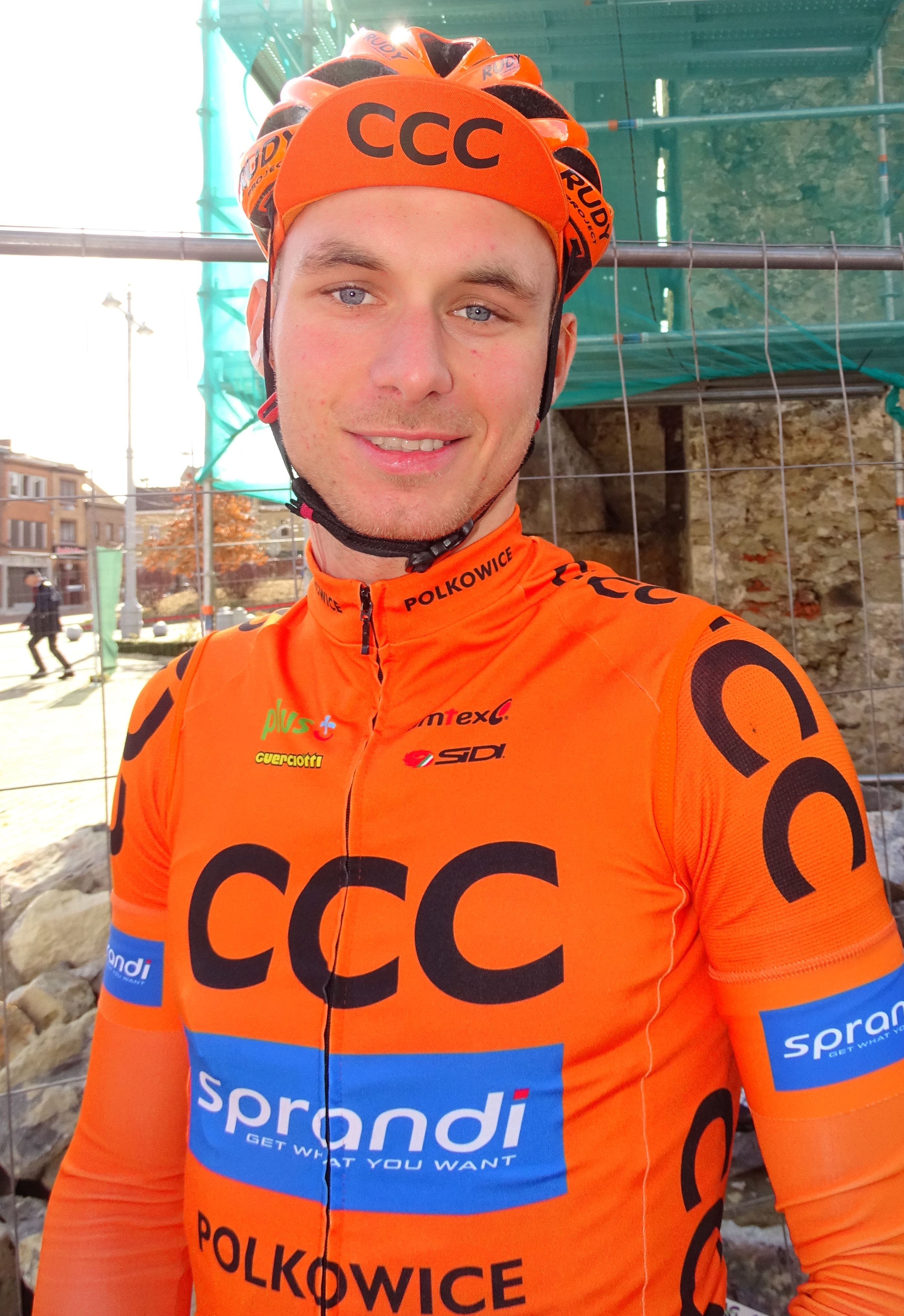 Reportage réalisé le mercredi 2 mars à l'occasion du départ du Samyn des Dames 2016 et du Samyn 2016 à Quaregnon, Belgique.